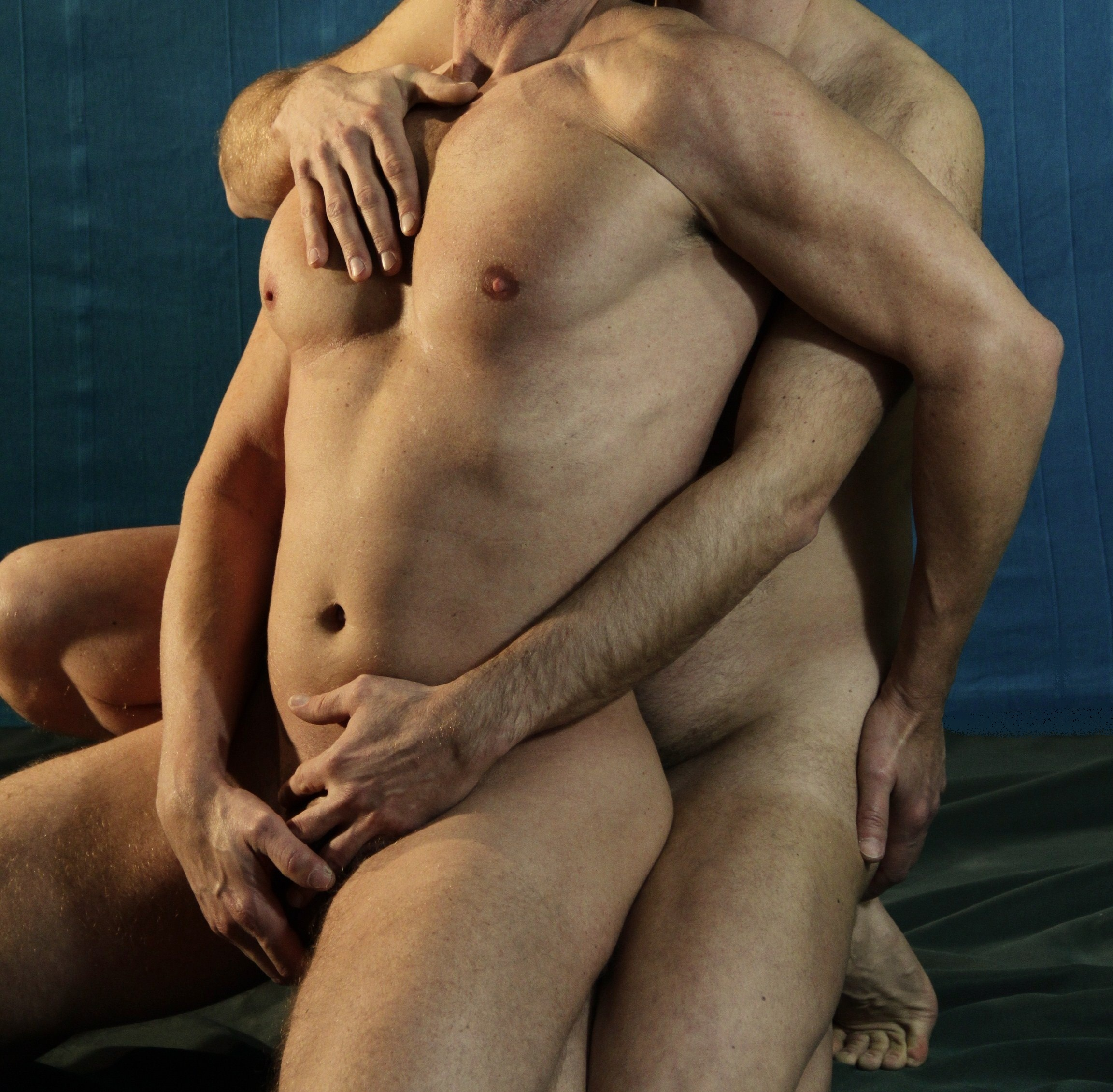 Berührung sitzend